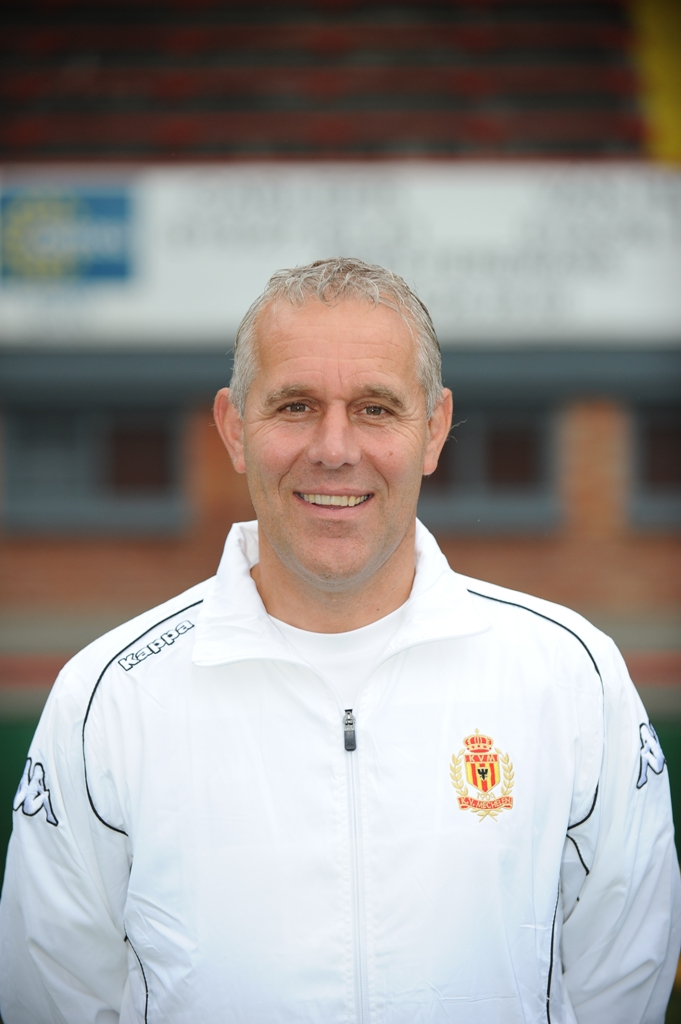 Belgisch/Nederlandse voetbaltrainer